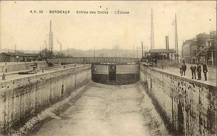 Chantier naval